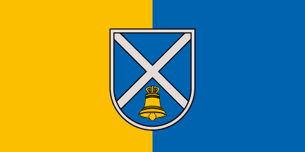 Iecavas novada karogs